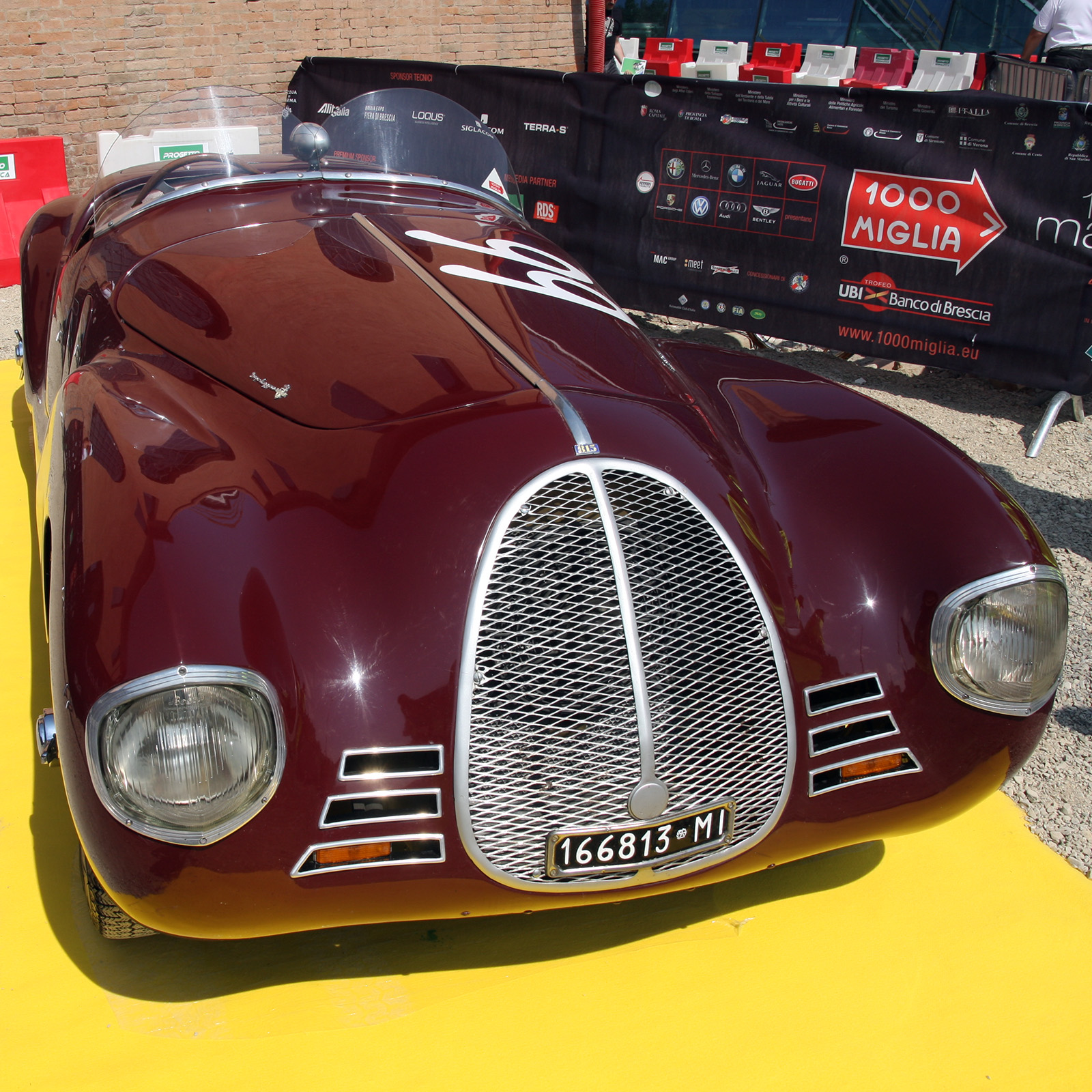 La Auto Avio Costruzioni 815 è una autovettura spyder progettata da Enzo Ferrari e Aberto Massimino in collaborazione con Vittorio Bellentani nel 1940 e realizzata in soli due esemplari, nelle versioni coda lunga e coda corta. Dei due unici esemplari costruiti ne rimane uno solo, il modello a "coda corta".